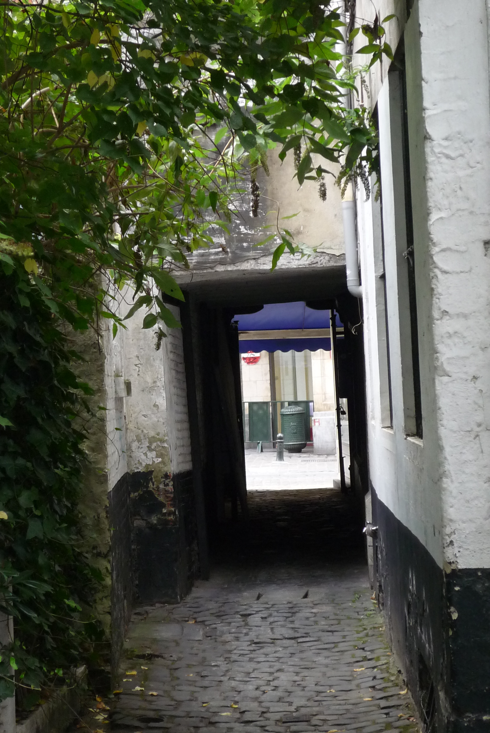 Bruxelles, l'impasse Sainte-Pétronille jadis Impasse des Roses. Photo prise le 7 septembre 2009.